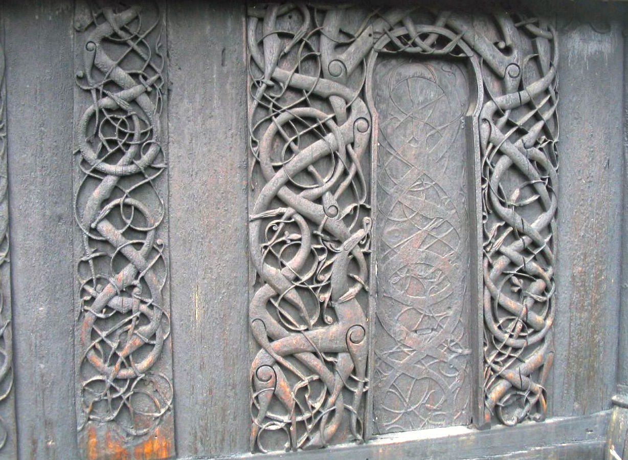 Urnesportalen, Urnes stavkyrkje